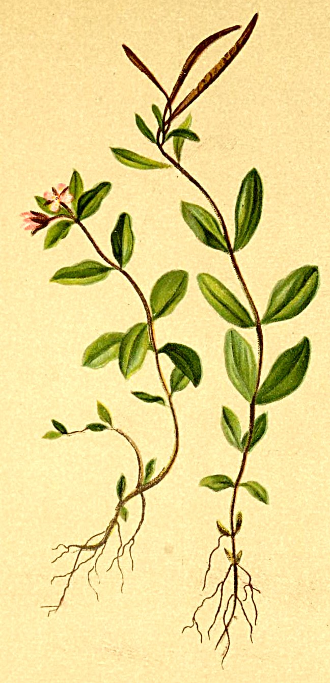 Epilobium anagalidifolium